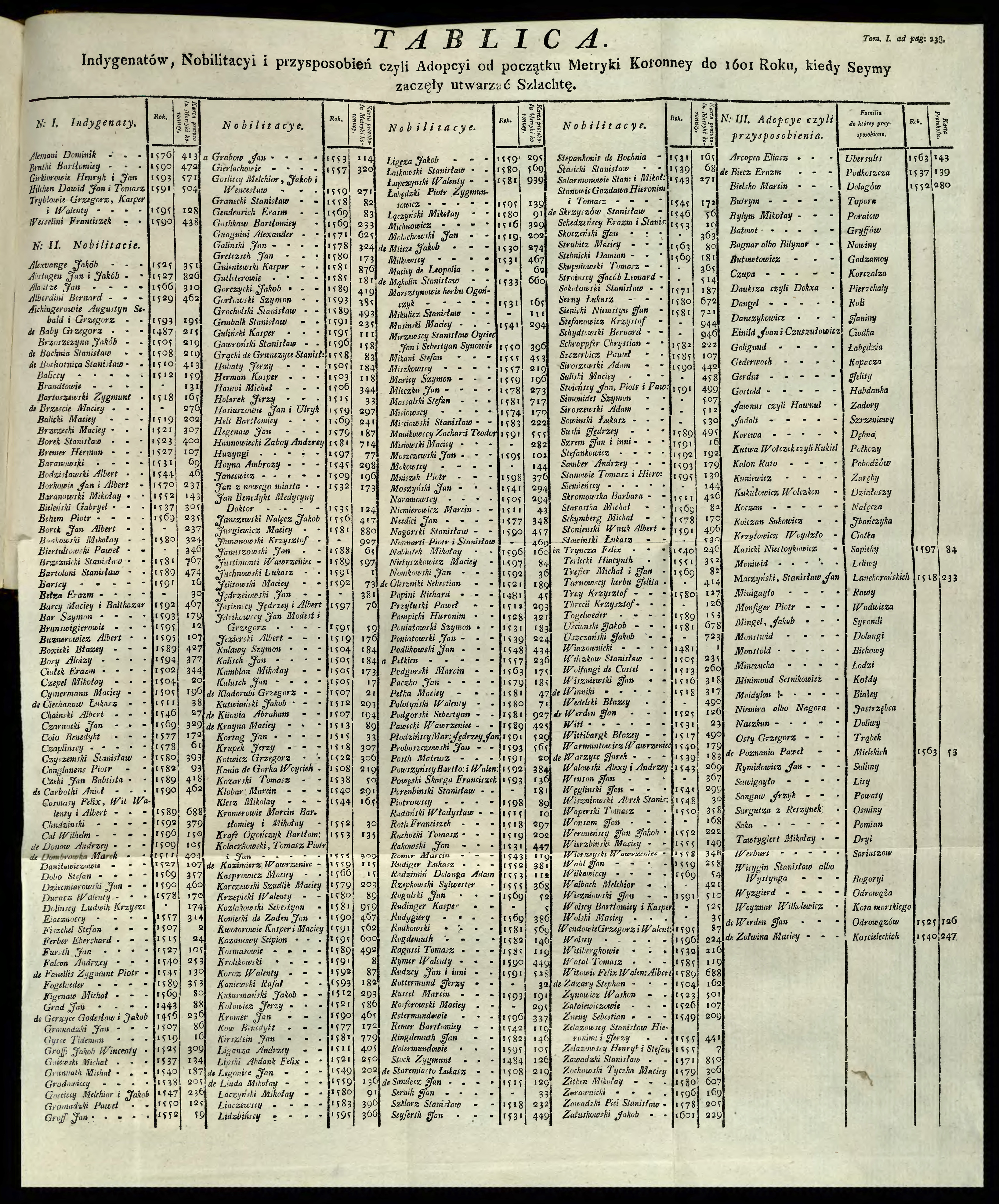 Enregistrement de Sebestyan Podgorski anobli en 1581, ref. 927 (Table de la noblesse polonaise de 1601).